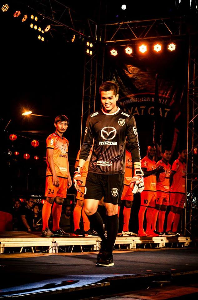 football